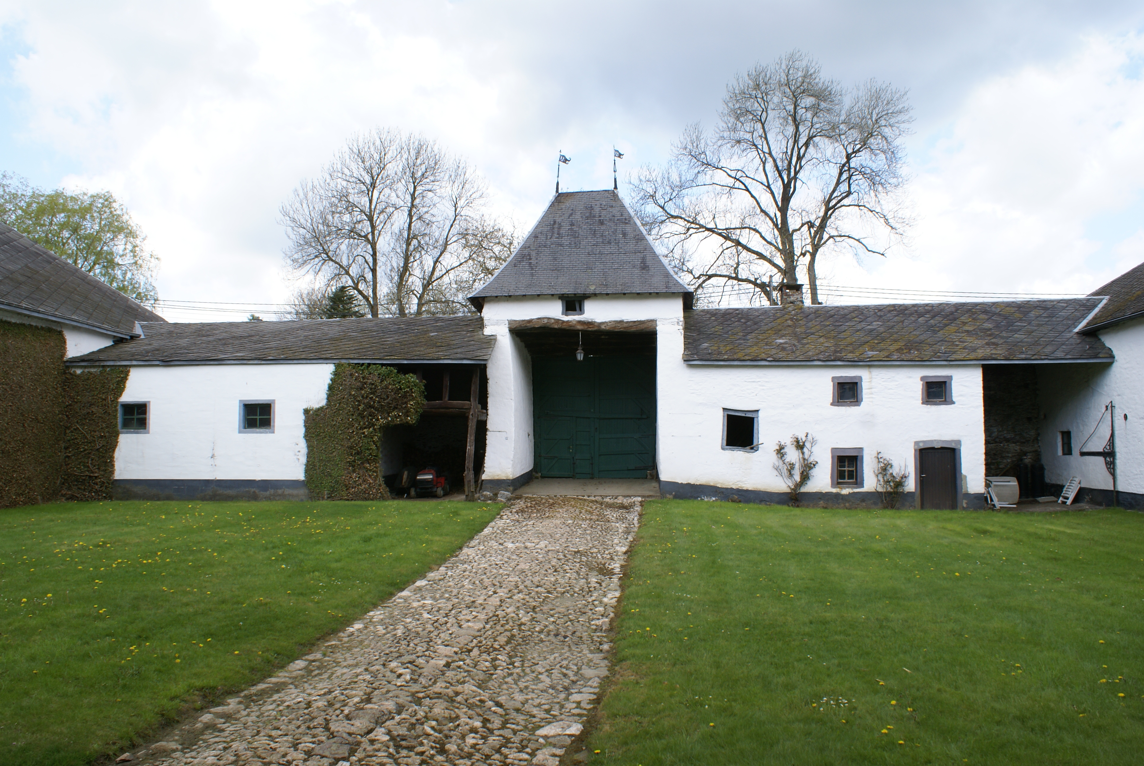 angle sud cour intérieure chateau de steinbach